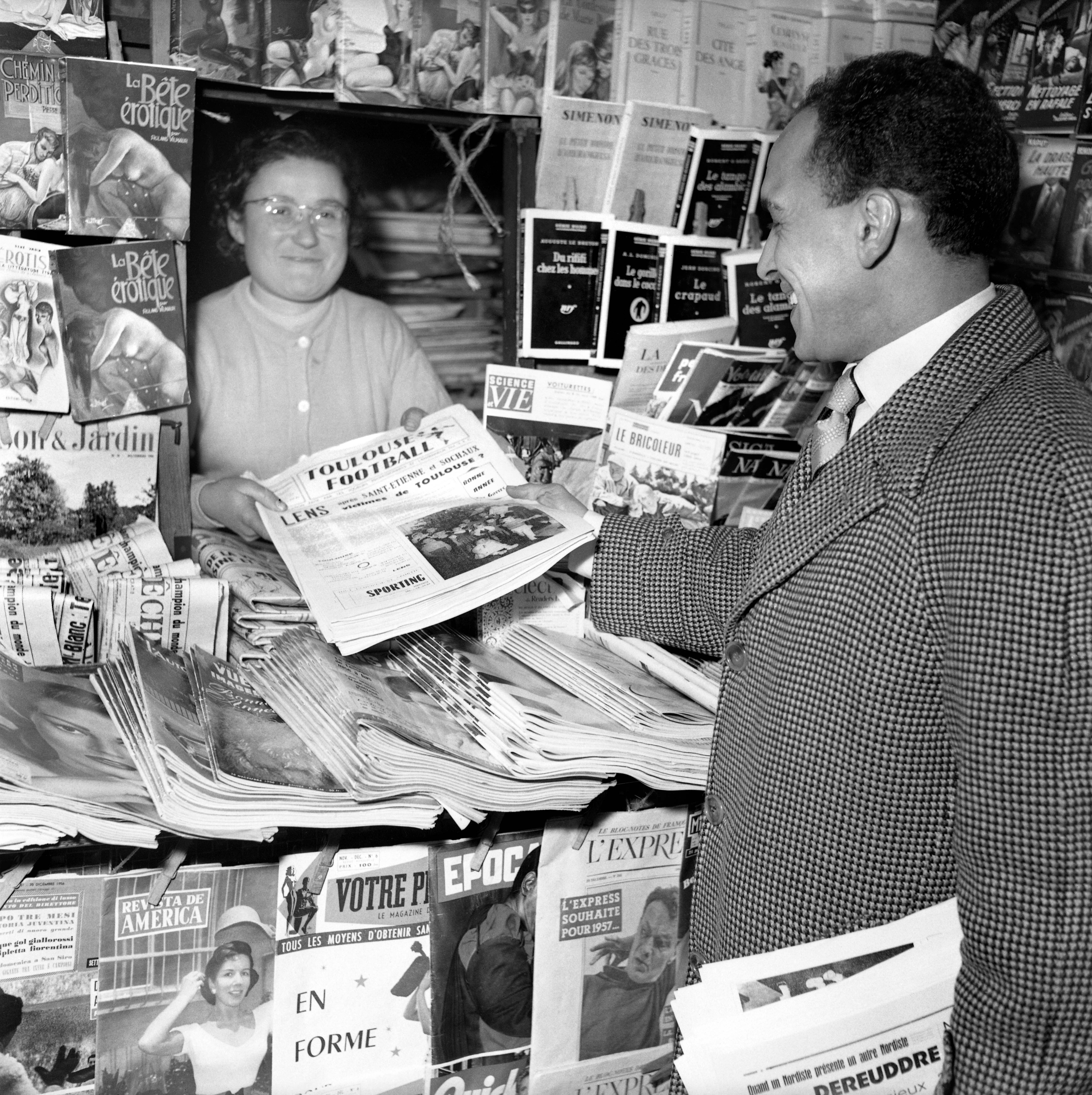 Kiosque de journaux. 2-3 Janvier 1957. Vue d'Abdelhamid Bouchouk, joueur du Toulouse Football Club, distribuant le journal "Toulouse Football" à une vendeuse de journaux installée dans un kiosque. Observation: Négatif du tirage contact 53Fi6431.